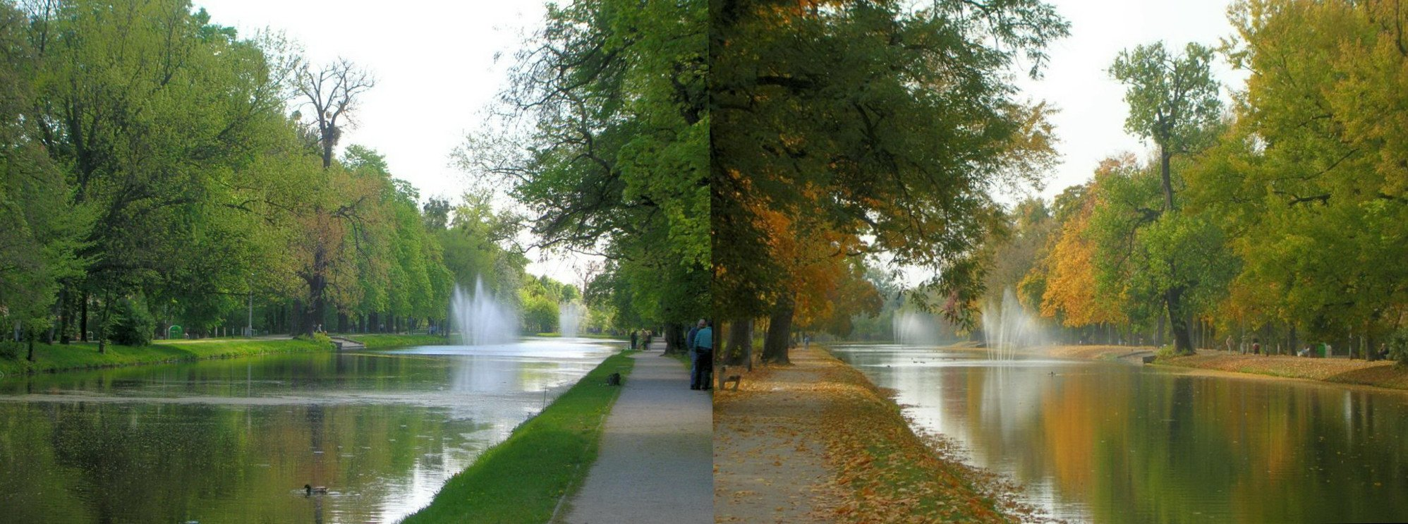 Stary Kanał Bydgoski